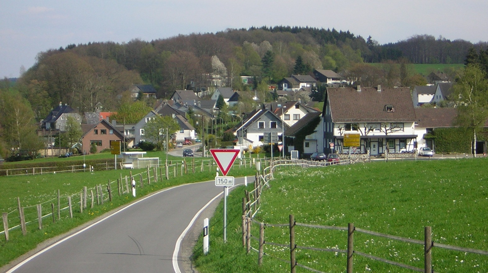 Dohrgaul in Wipperfürth.